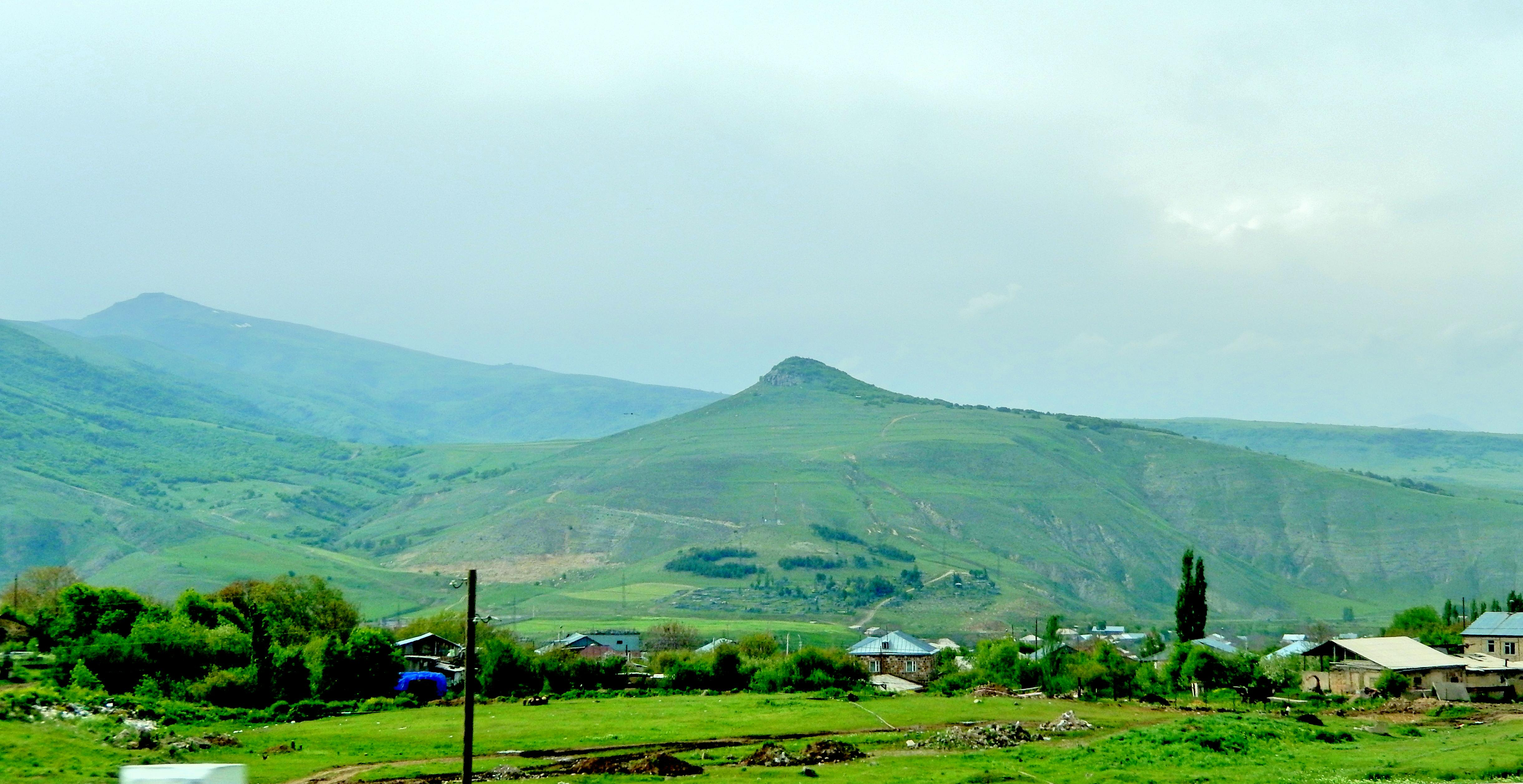 Քաղսի